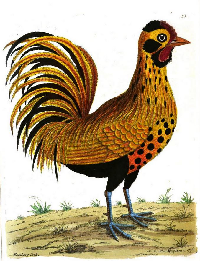 Afbeelding van een goudgeloverd Hollands hoen (Albin, 1740)